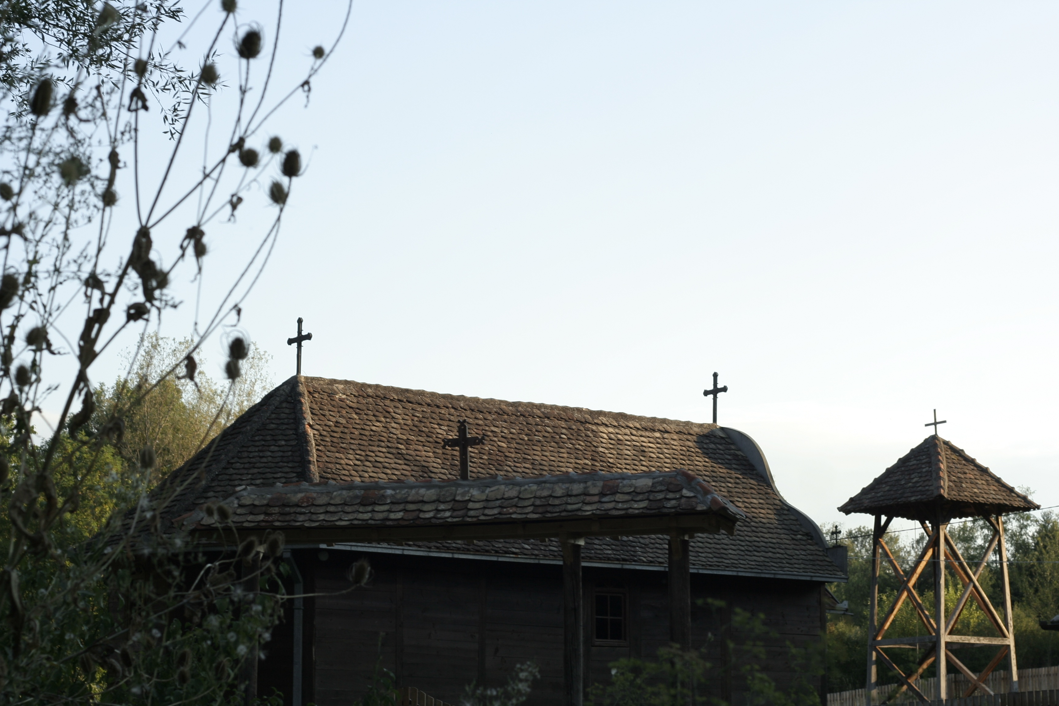 Црква брвнара у Орашцу